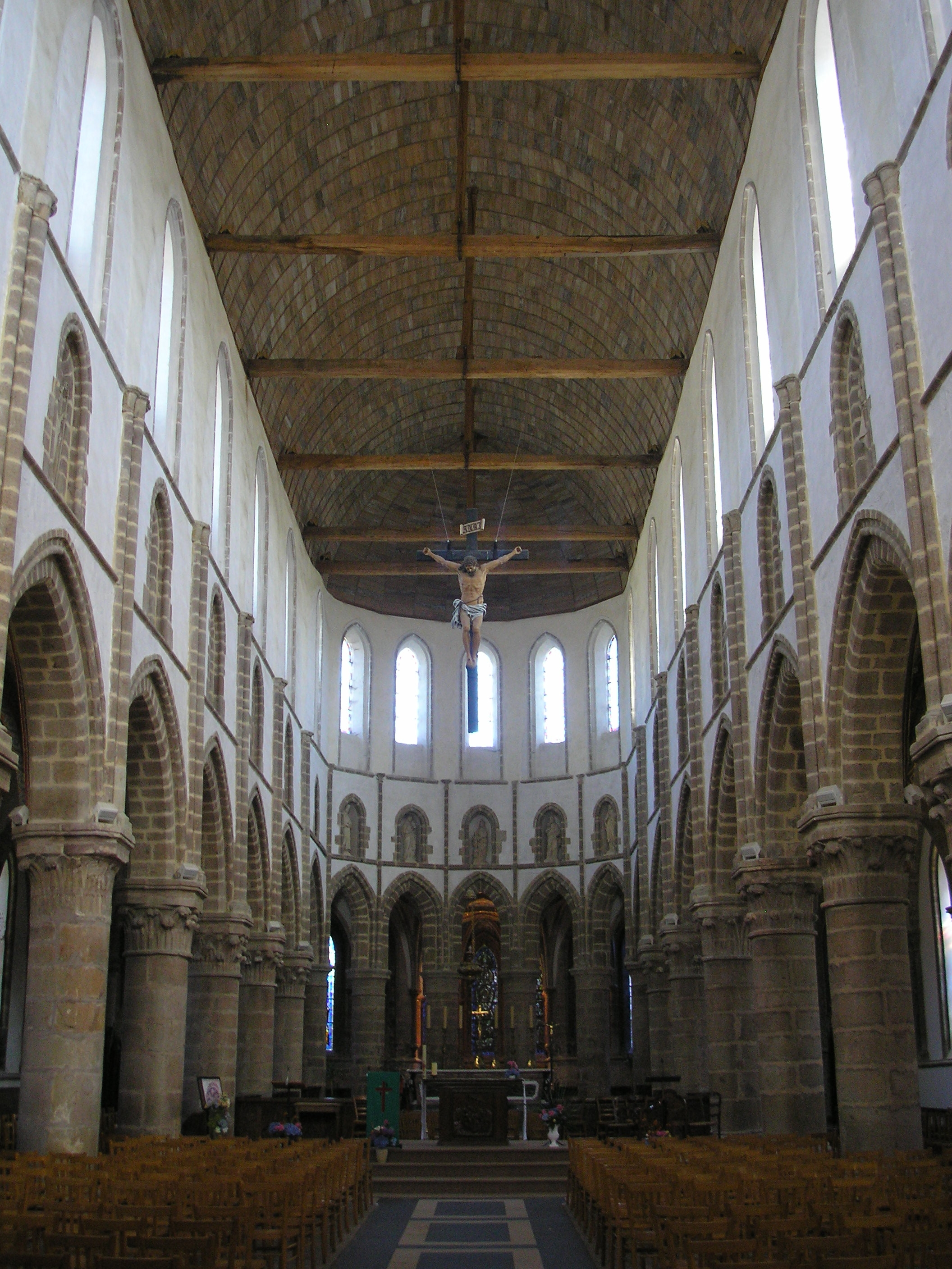 Mortain (Normandie, France). La nef de la collégiale Saint-Évroult.